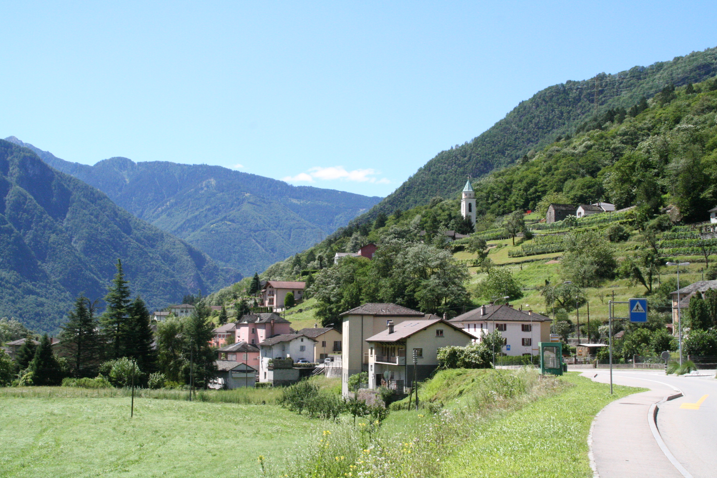 Cama